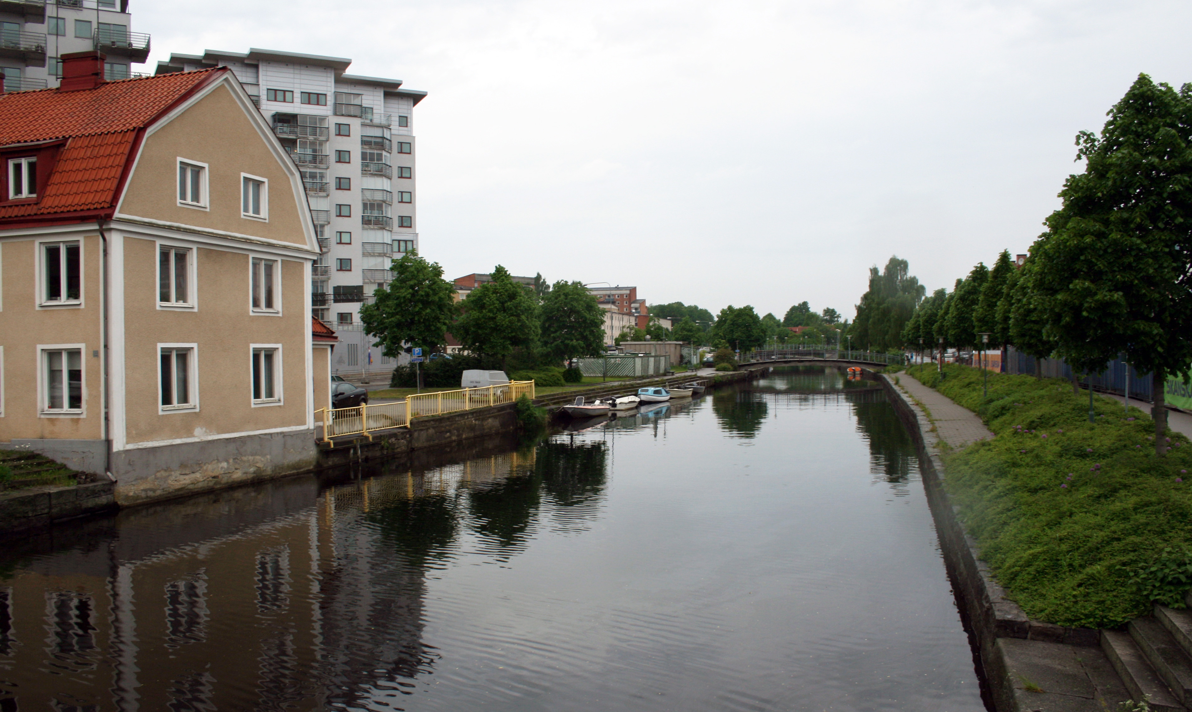 Mieån i Karlshamn, i närheten av dess mynning i Östersjön.